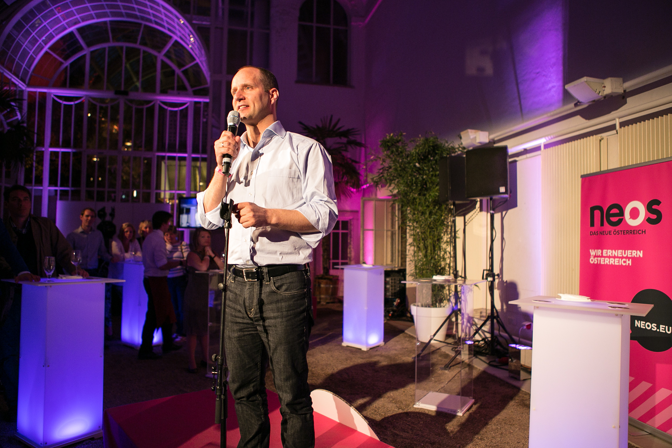 Matthias Strolz, Vorsitzender von NEOS - Das Neue Österreich beim NEOS-Event Es geht auch anders! Das FEST! (Foto cc-by-sa Nicole Heiling)